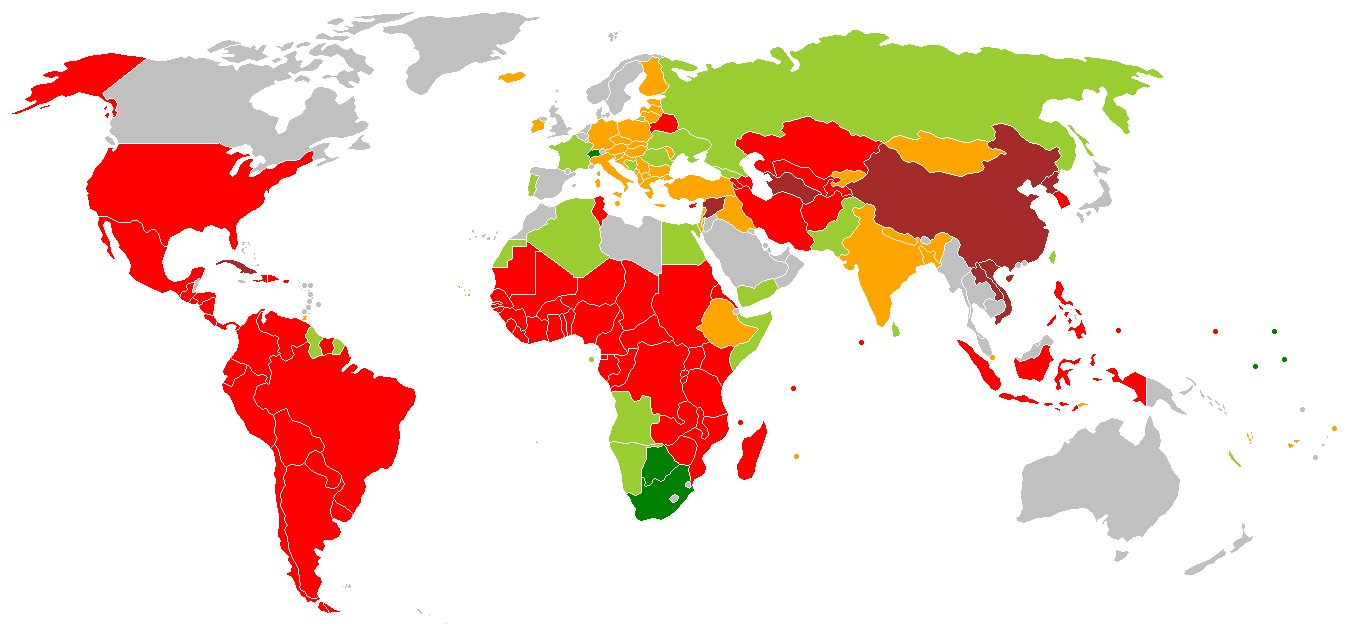 Tipos de República no mundo.